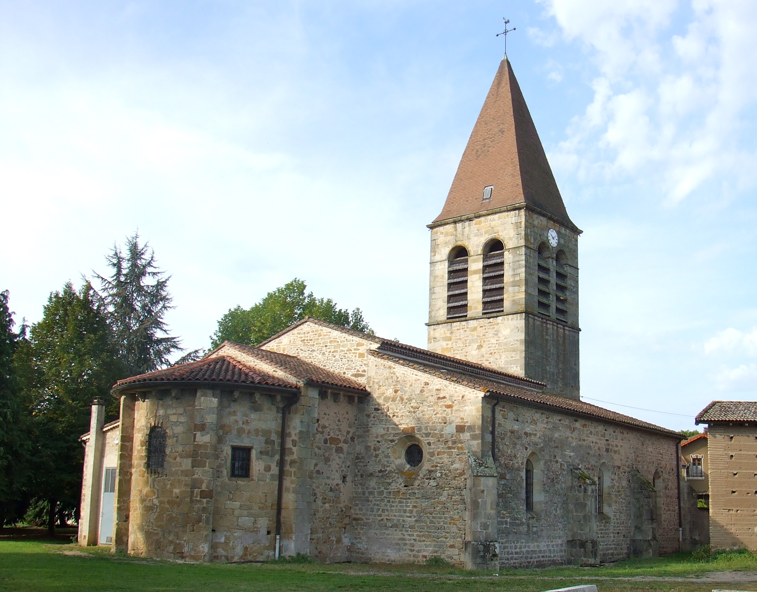 Eglise St Bonnet à Orléat, Puy-de-Dôme .